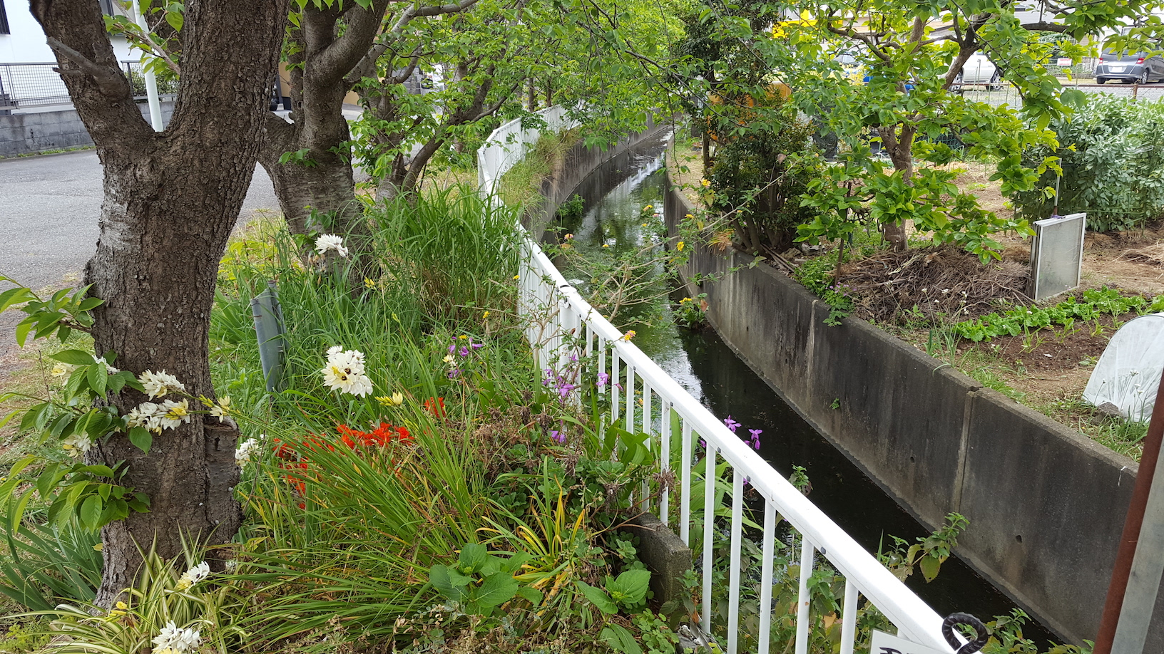 捨川（してがわ）中流